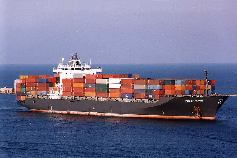 MS POTSDAM unter dem Charternamen IPEX EMPEROR in Port Said IMO Number: 9121259